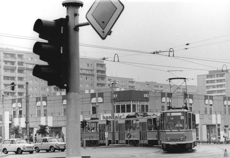 ADN-ZB-Franke-10.8.87-kb-Berlin: Straßenbahnlinie 28- Eine Straßenbahnstrecke wurde zwischen Buschallee und Prerower Platz (Foto) in Berlin-Hohenschönhausen in Betrieb genommen. Die neue Linie hat die Nummer 28, weil sie die bestehende Linie mit gleicher Nummer von und bis Rosa-Luxemburg-Platz verlängert.